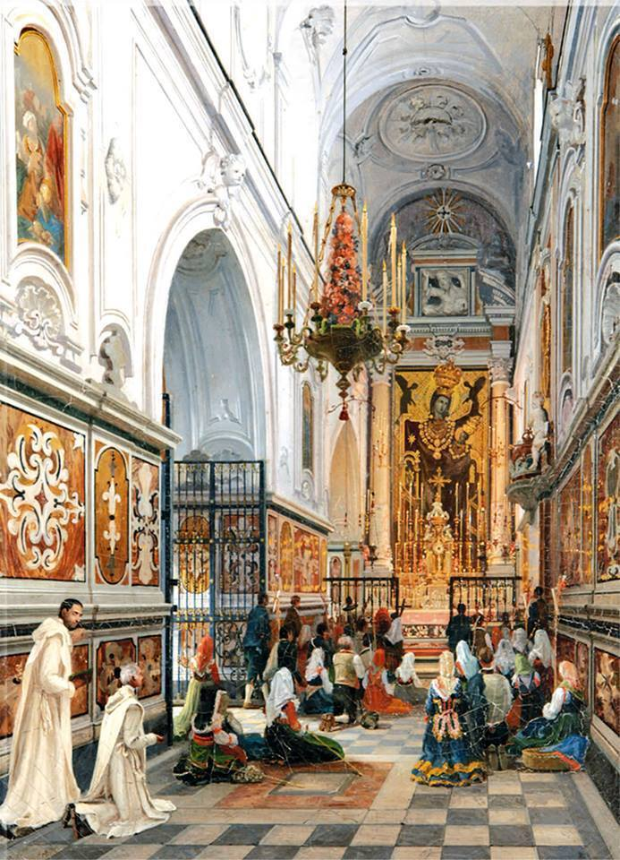 Santuario di Montevergine - Interno della chiesa. Dipinto di artista sconosciuto.